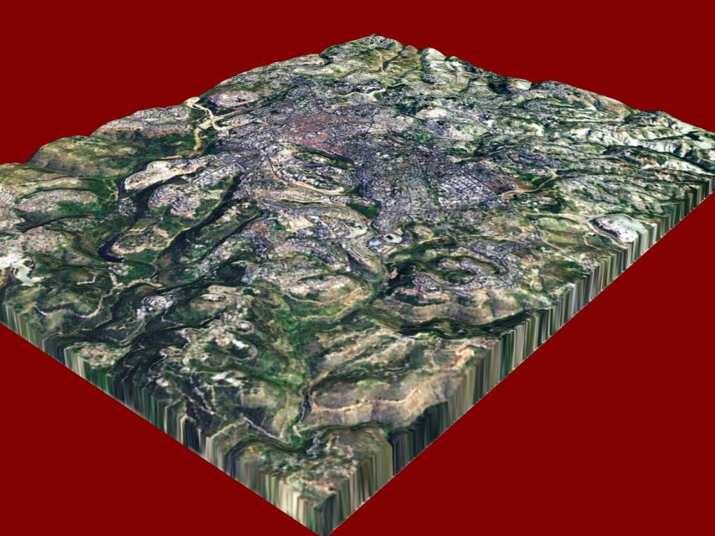 Jerusalim 3D folosind date SRTM si textura World Imagery.